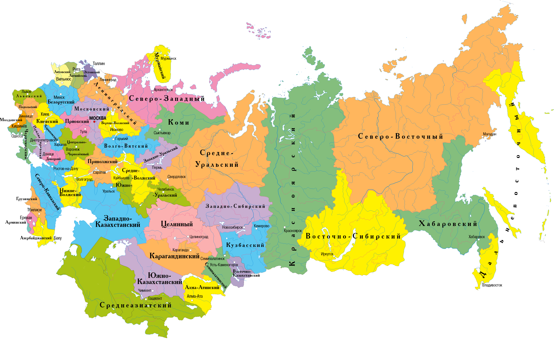 Карта совнархозов в 1963 г.